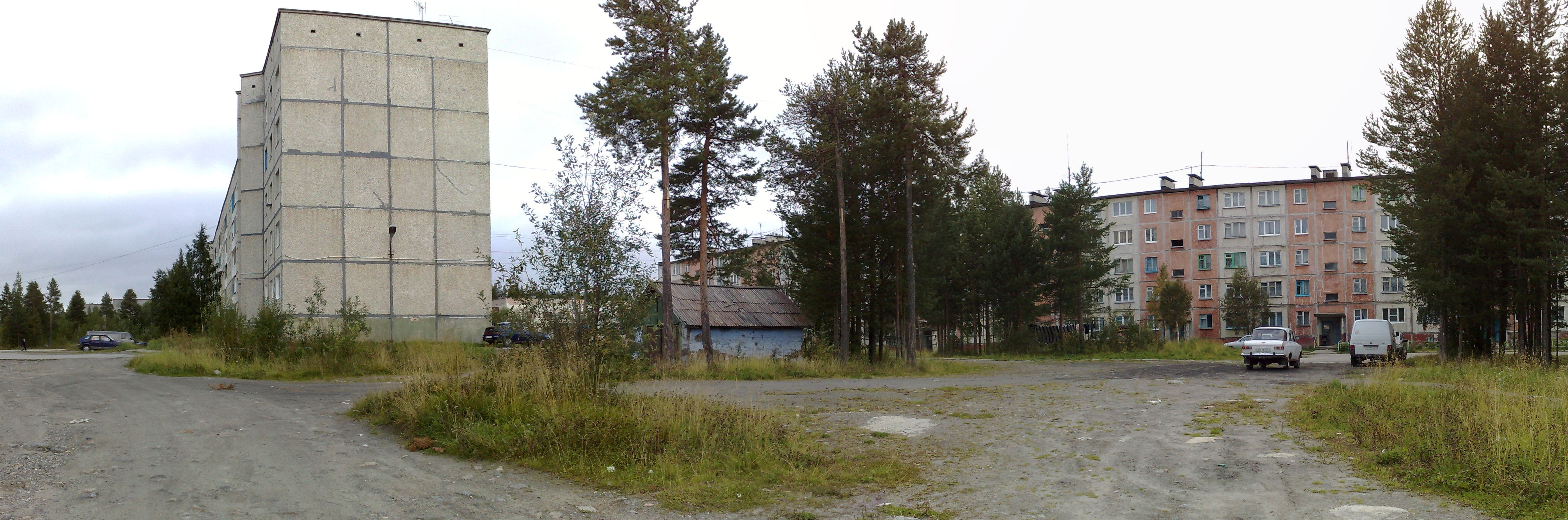 Дома в Африканде